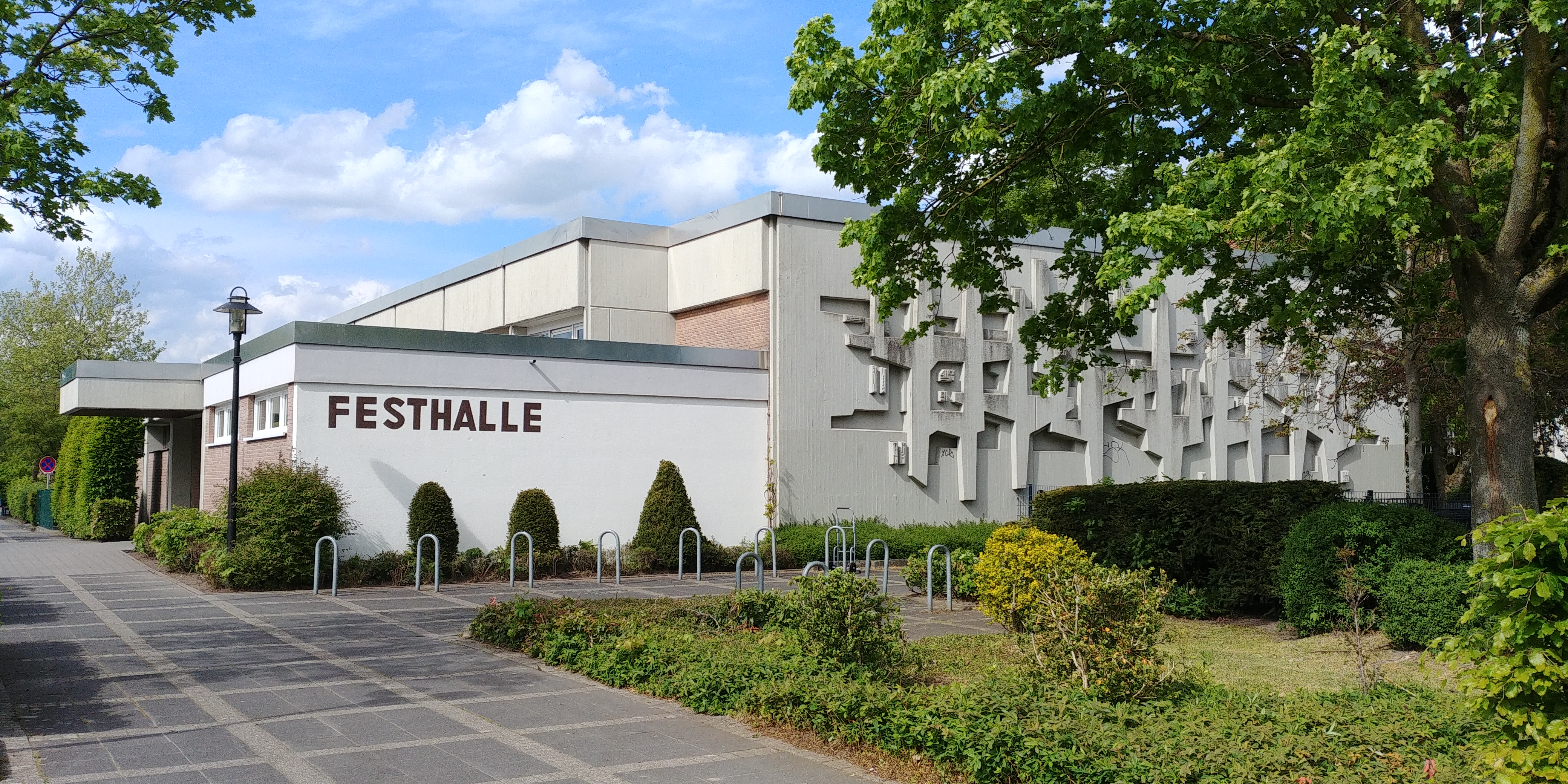 Festhalle der Gemeinde Everswinkel